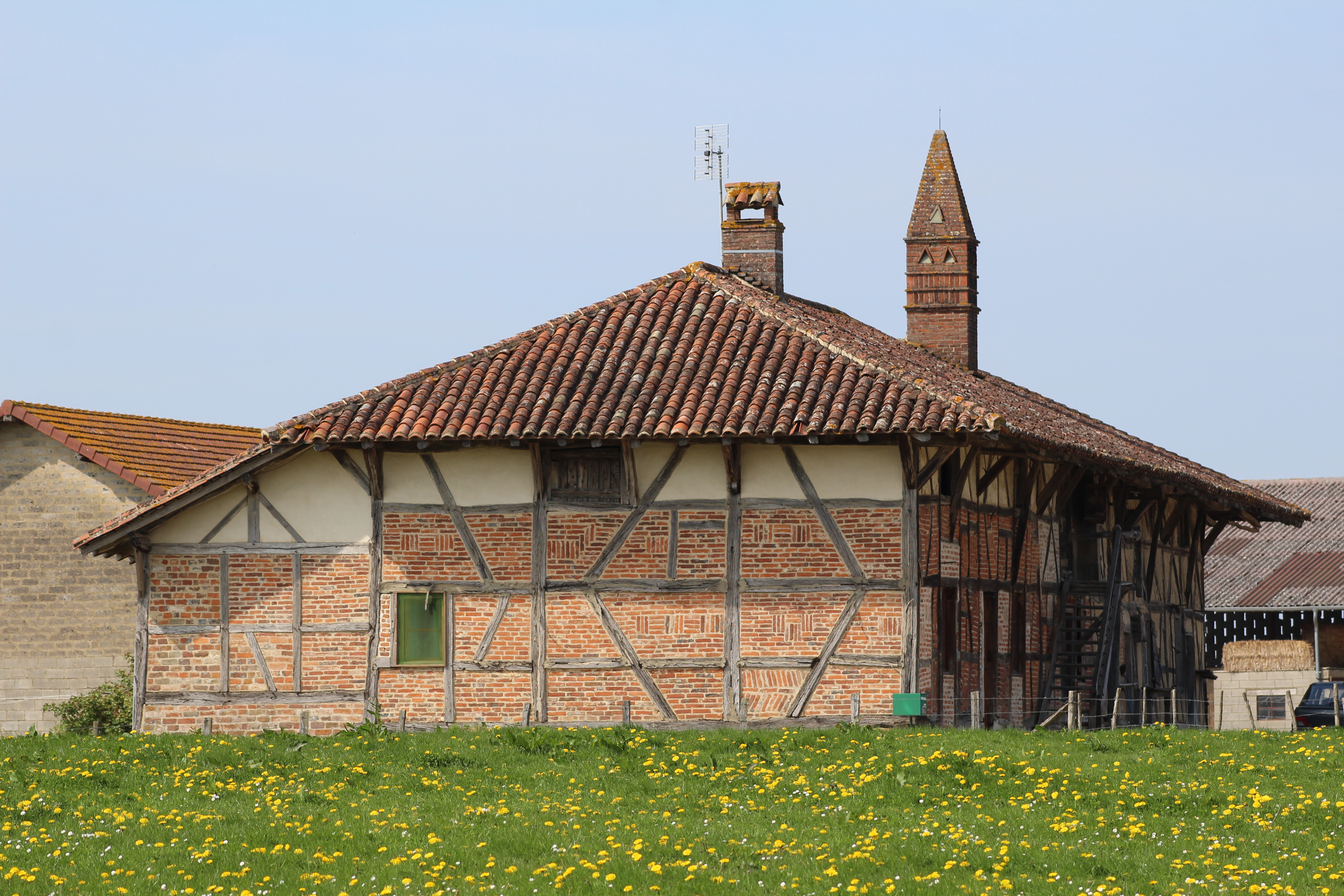 Ferme Ferrand, Vernoux.